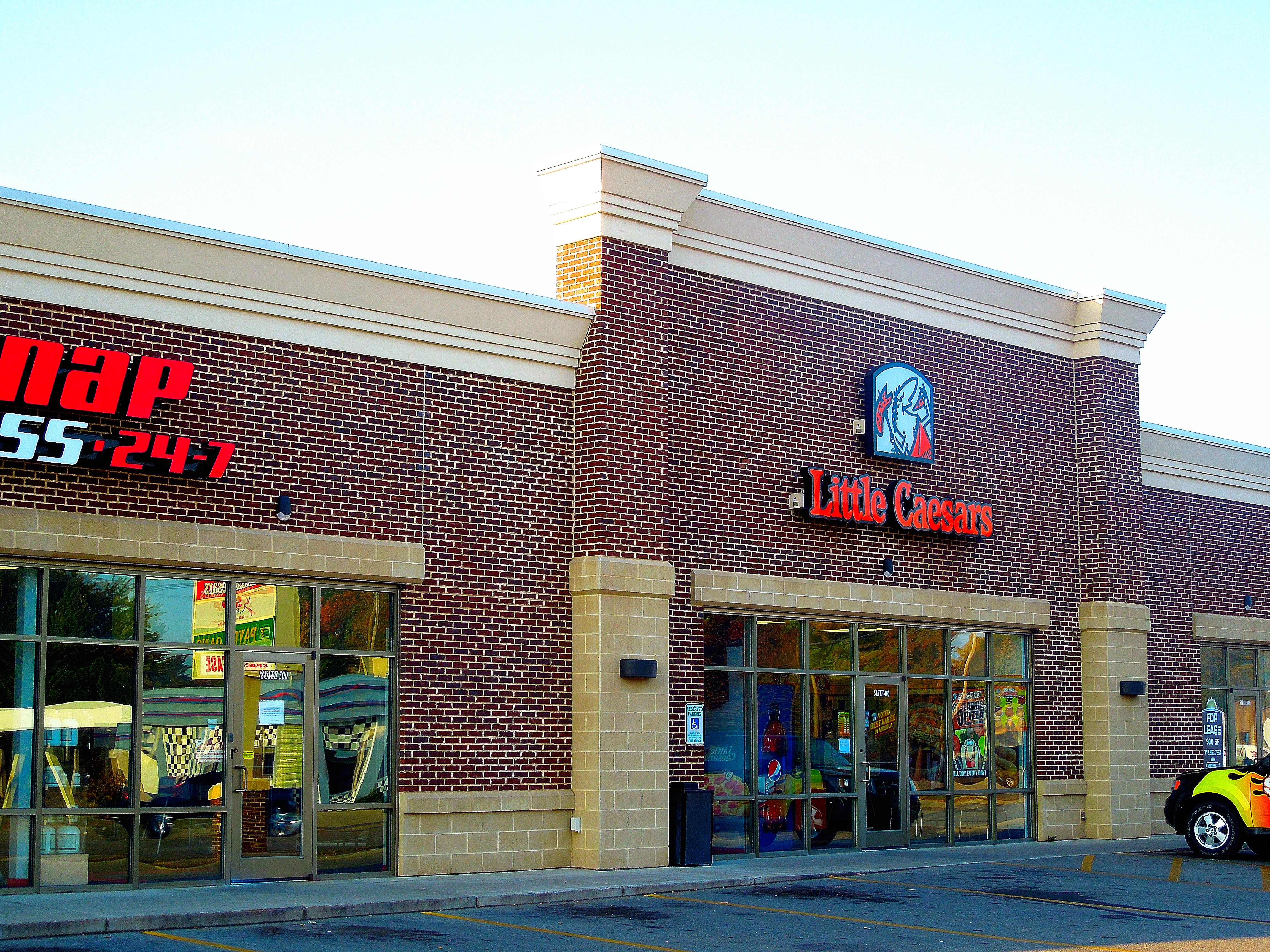 Little Caesars®